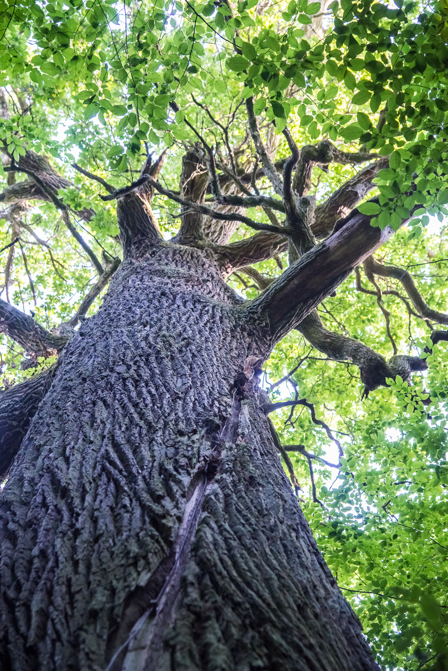 Старейший дуб в Республике Беларусь - 800 лет. Дуб находится в Брестской области, Малоритской районе, возле деревни Старое Романтово.